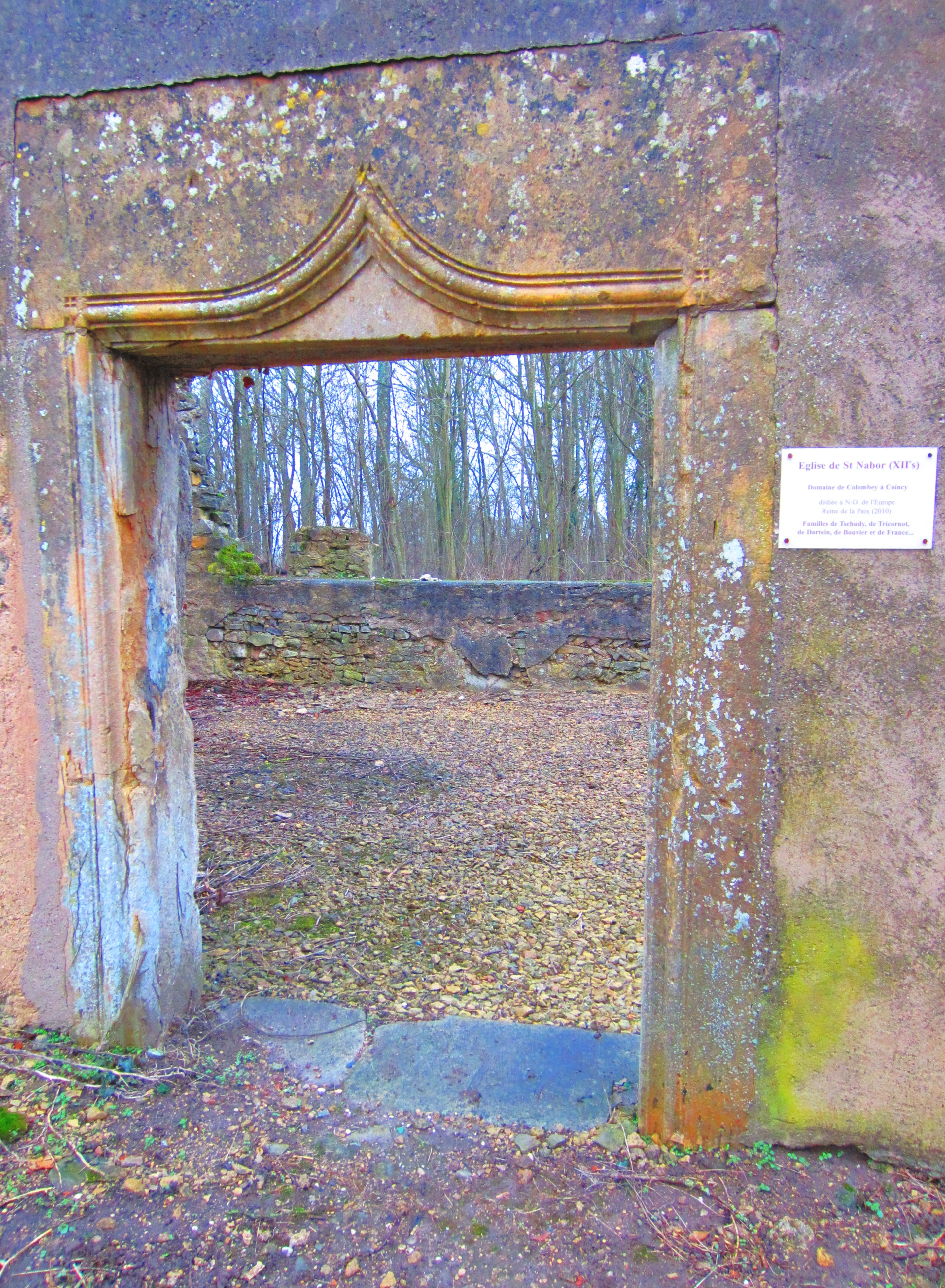 Description